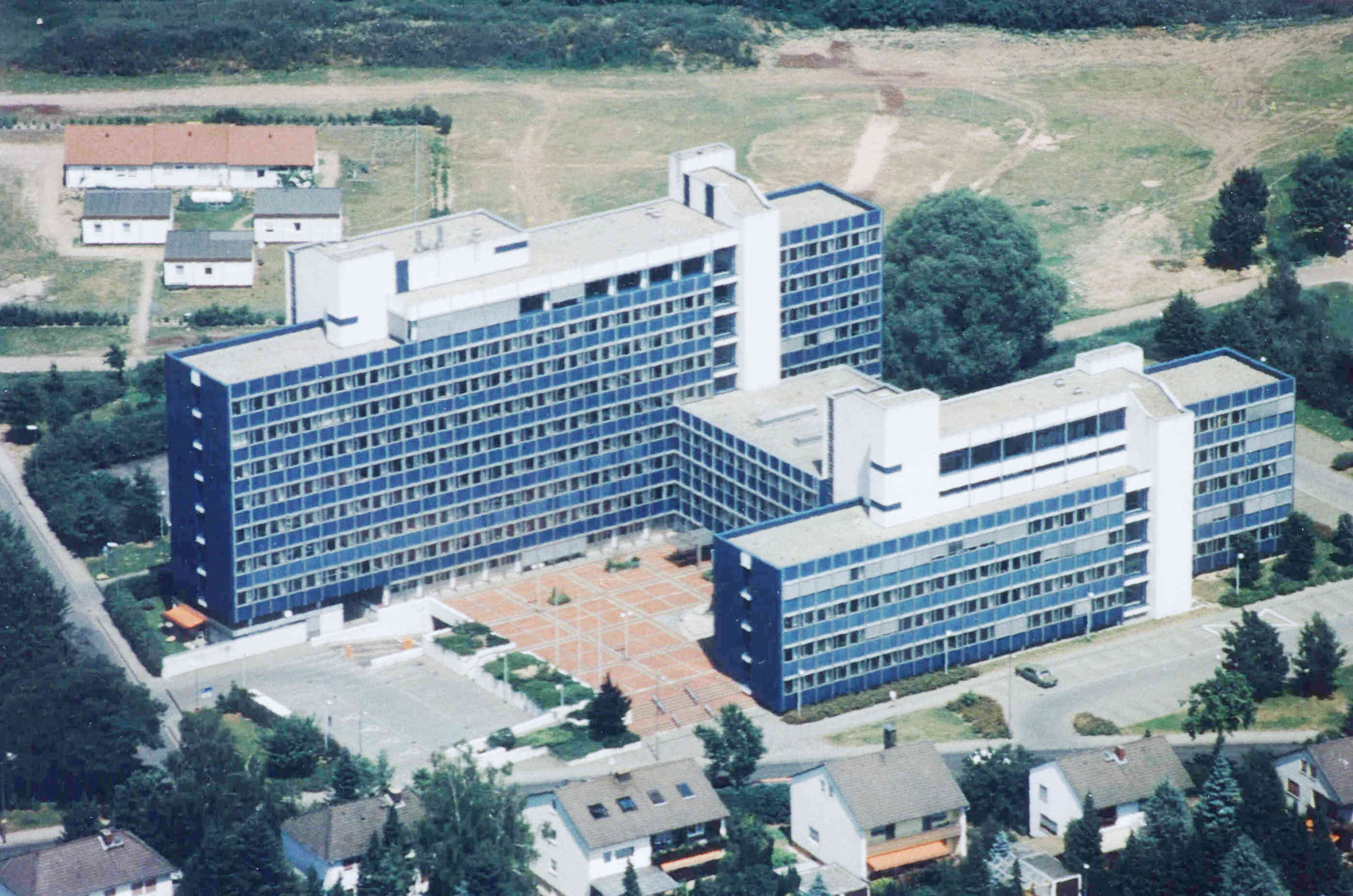 Aufnahme des 1987 neu erbauten Arbeitsgerichts